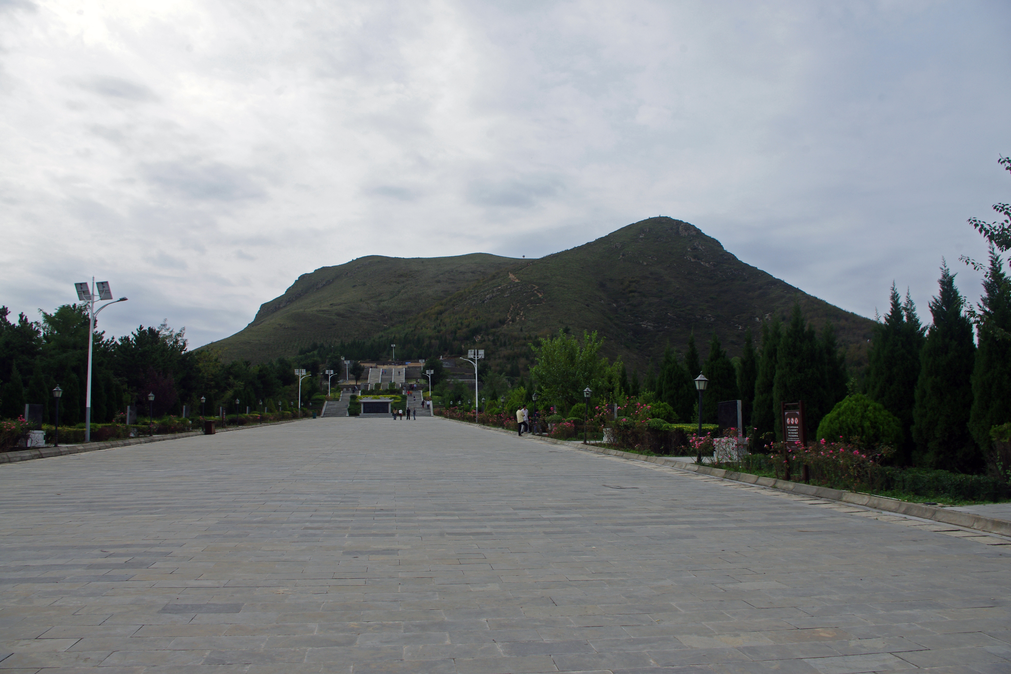 唐太宗昭陵